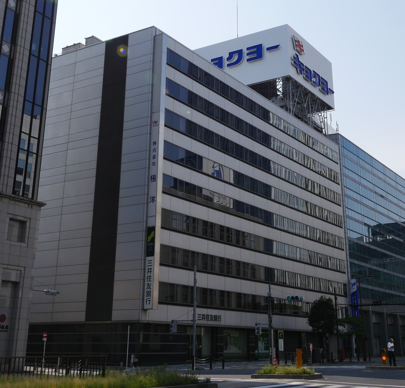 極洋本社（住友生命山王ビル）